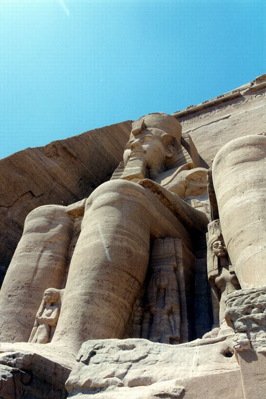 Abou Simbel, le temple de Ramses II : Au pied des colosses, adossés à la facade du temple, on distingue Néfertari et la reine-mère